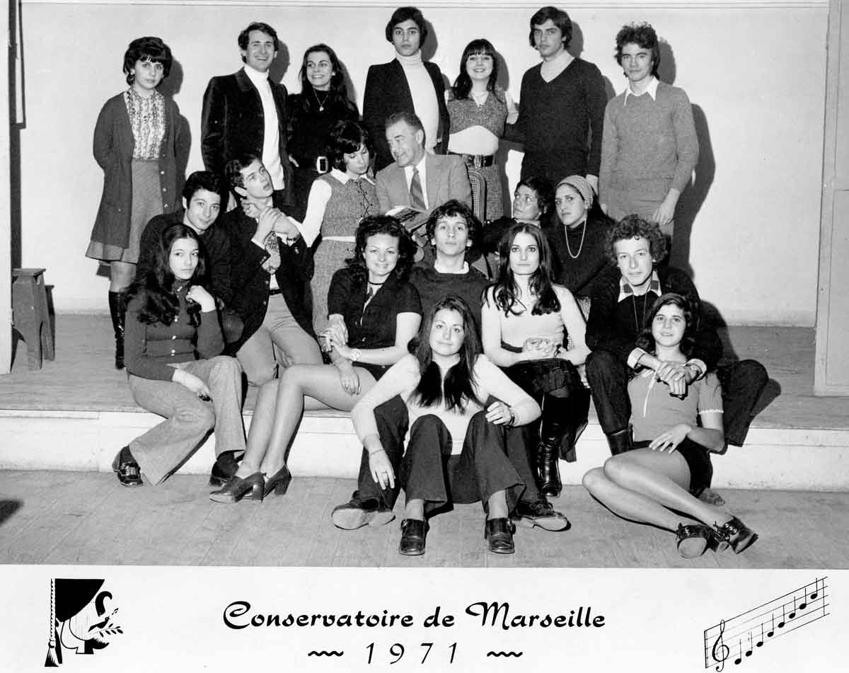 Photographie de groupe du Conservatoire d'Art Dramatique de Marseille de 1971 faisant apparaître Monsieur Claude Lehmann, professeur d'art dramatique (personnage en veston cravate, milieu). Autorisation du Copyright par Monsieur Philip Bride Directeur du Conservatoire National à Rayonnement Régional de Marseille le 20.07.2015.